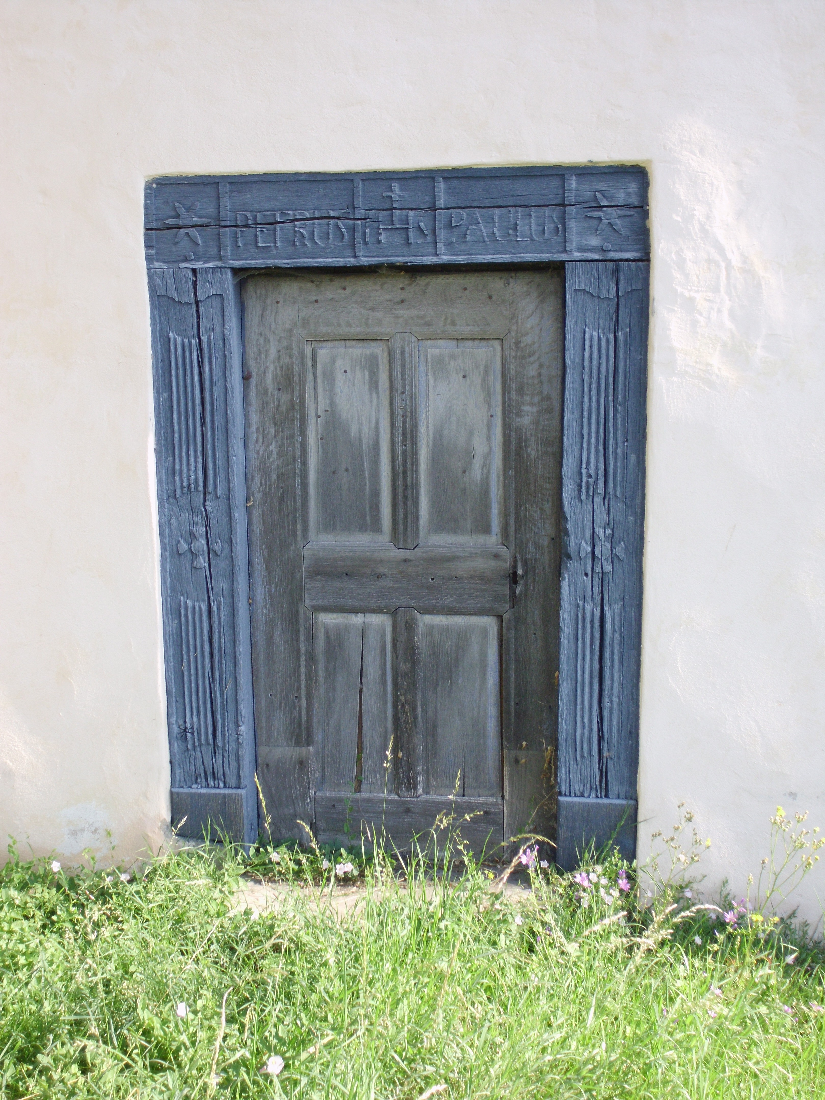 Kleinhöbing, Ortssteil von Thalmässing im mittelfränkischen Landkreis Roth, Eingang der ehemaligen Ortskirche St. Peter und Paul